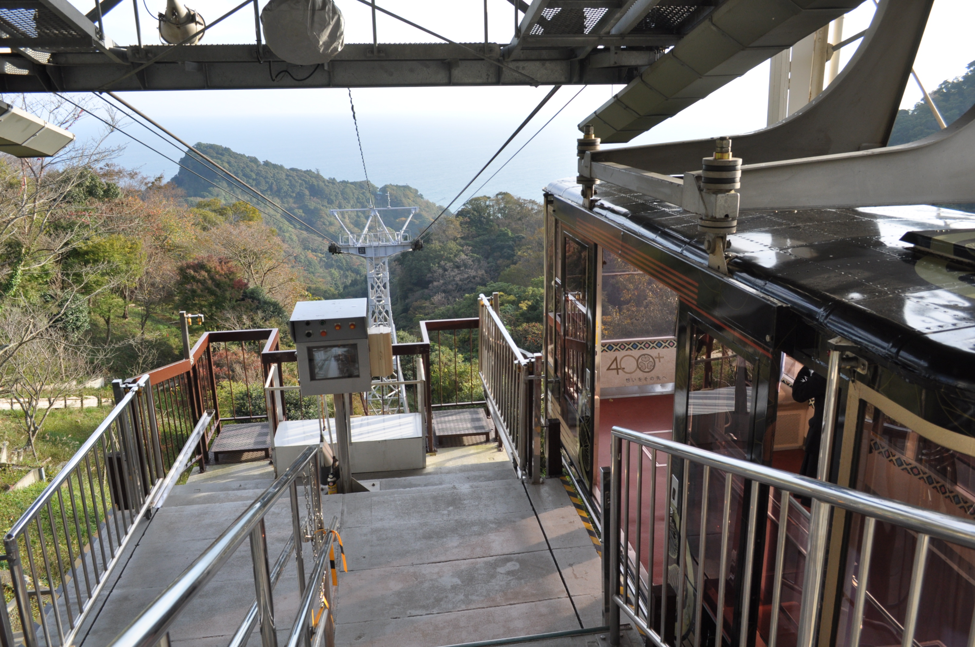 日本平ロープウエイ